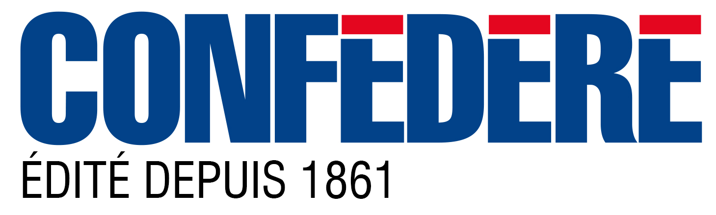 Logo du journal